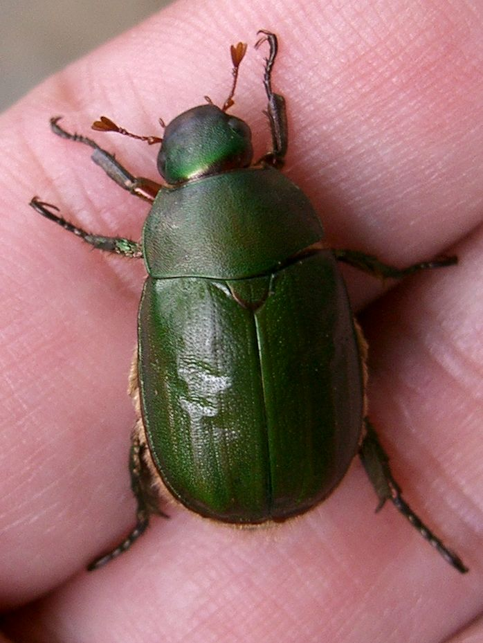 Scientific name Anomala albopilosa